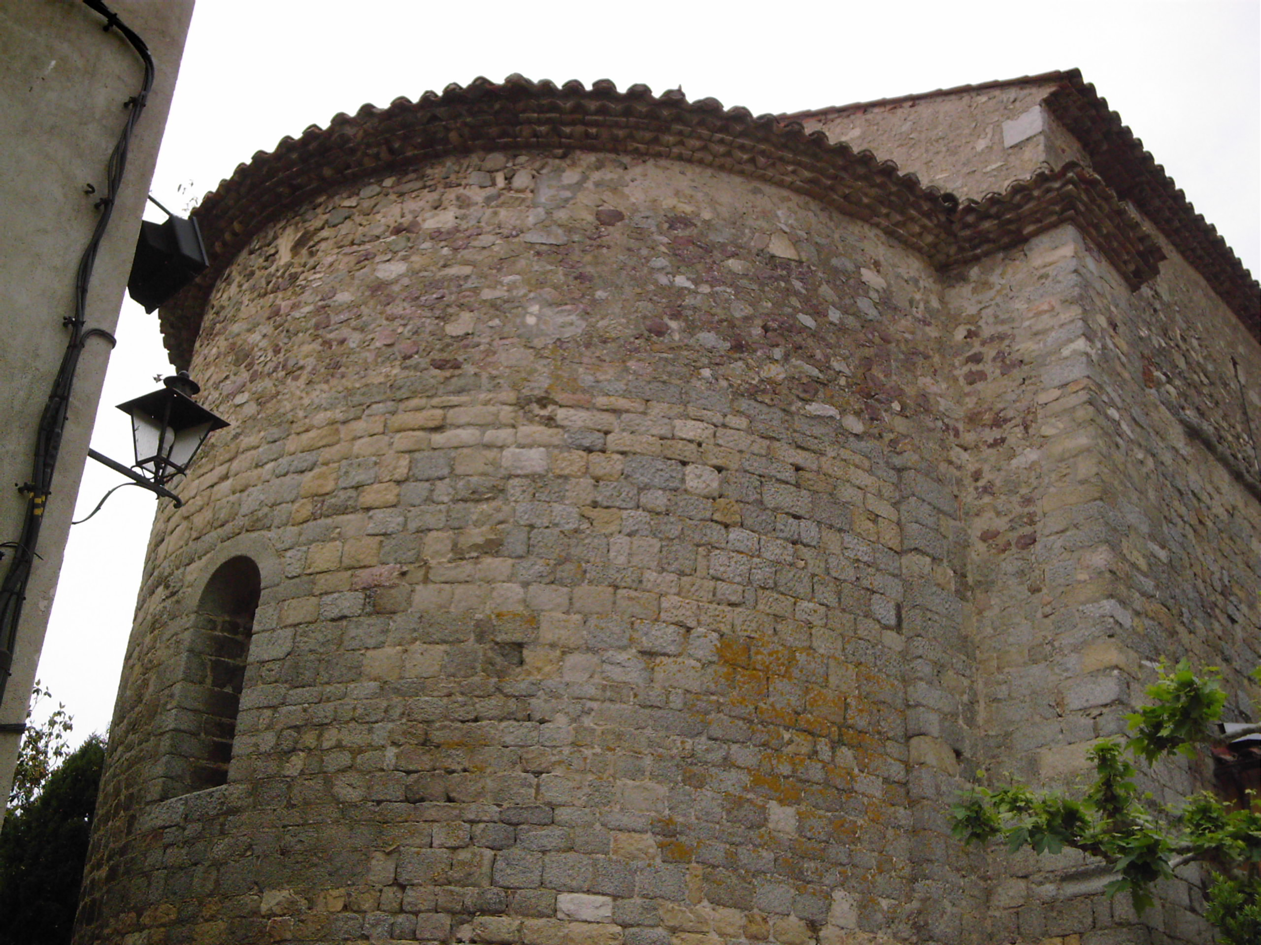 absis exterior